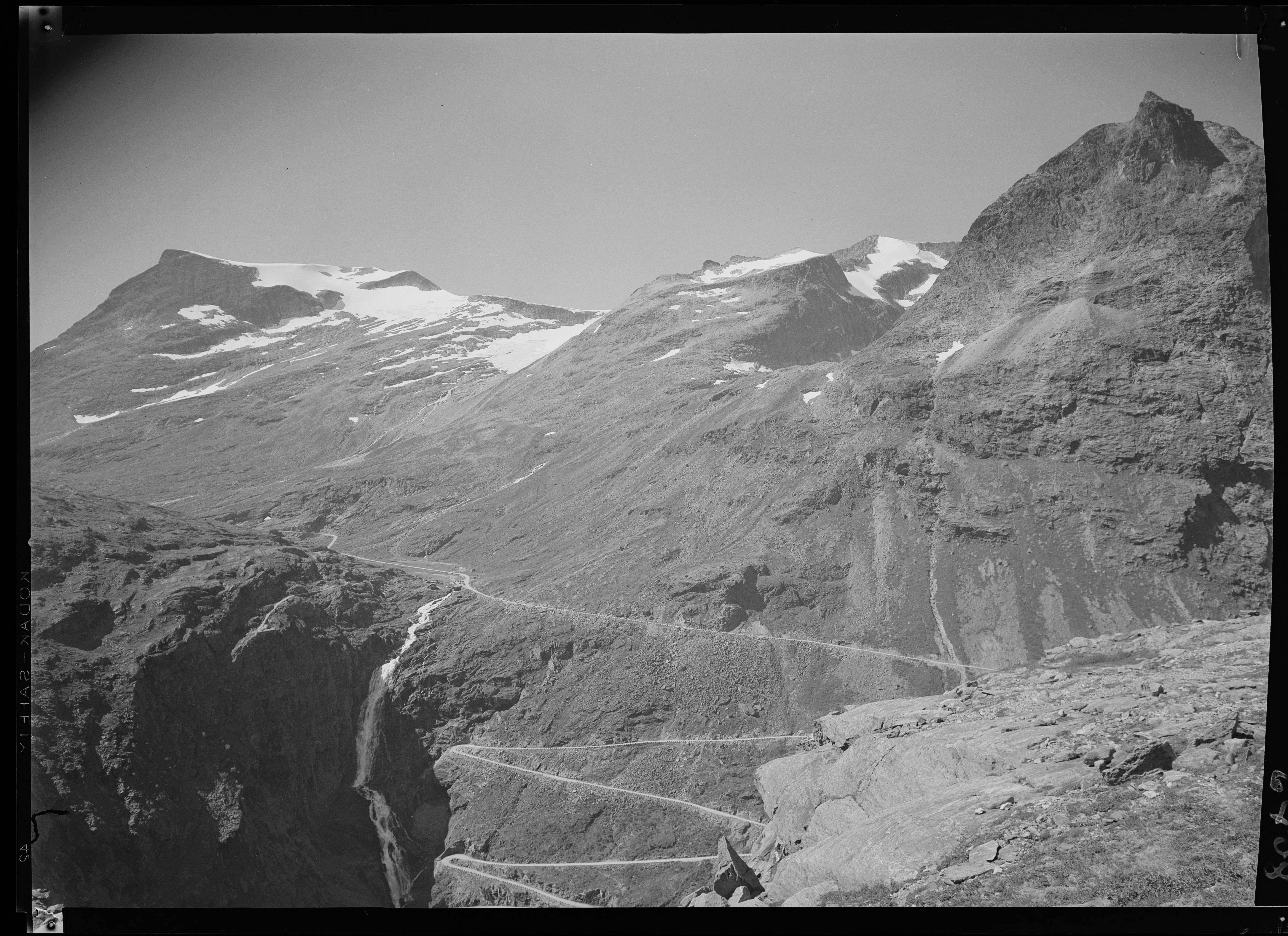 Bildet er hentet fra Nasjonalbibliotekets bildesamling. Anmerkninger til bildet var: Fotograf : ukjent Trollstigen, Rauma, Møre og Romsdal